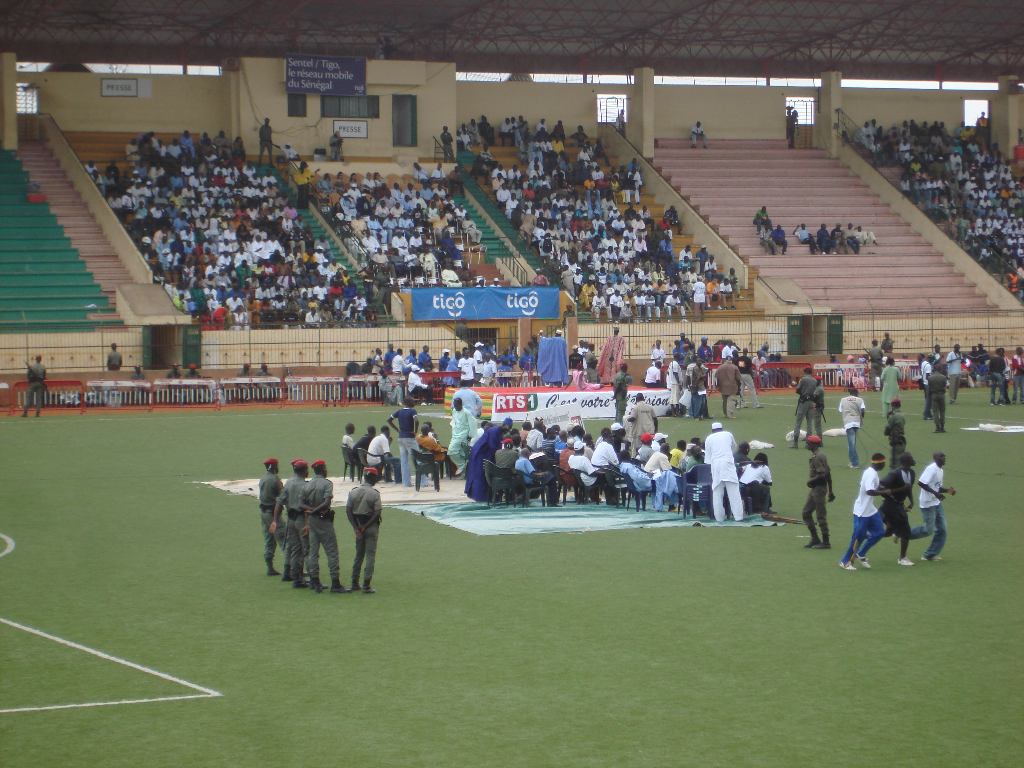 Les tribunes du stade Demba Diop à Dakar (Sénégal)